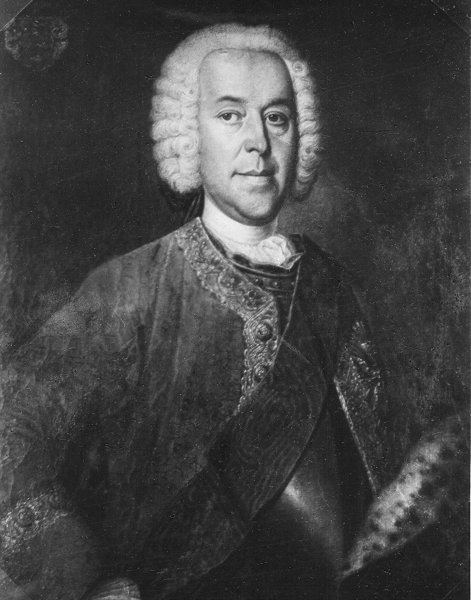 Portrait von Otto Christopher von der Howen